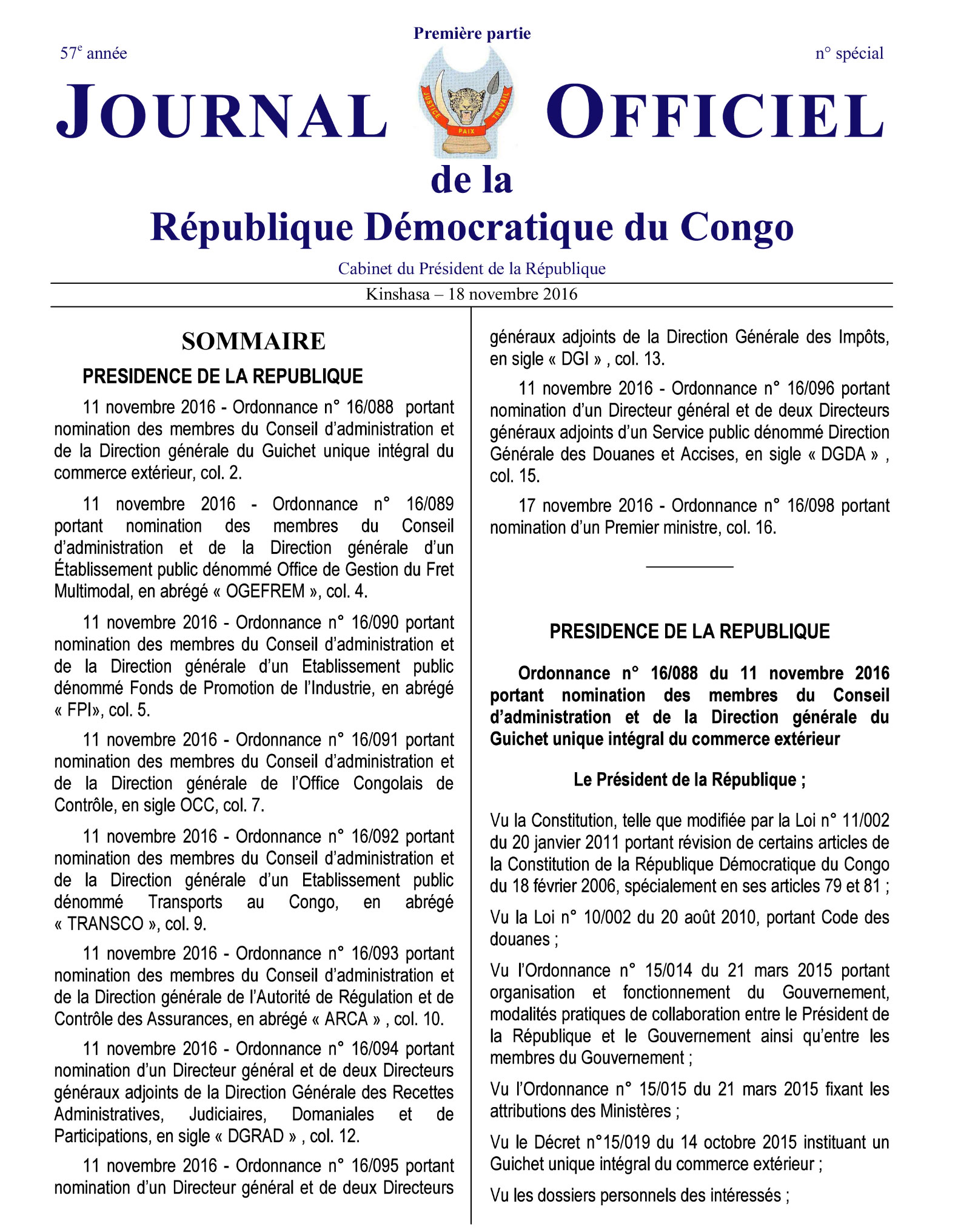 Extrait de la nomination de Monsieur Déo Rugwiza Magera